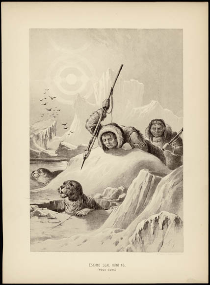 Eskimo Seal Hunting